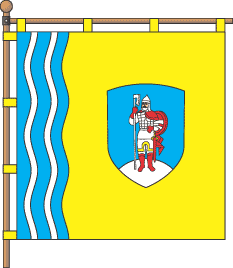 Прапор міста Канів